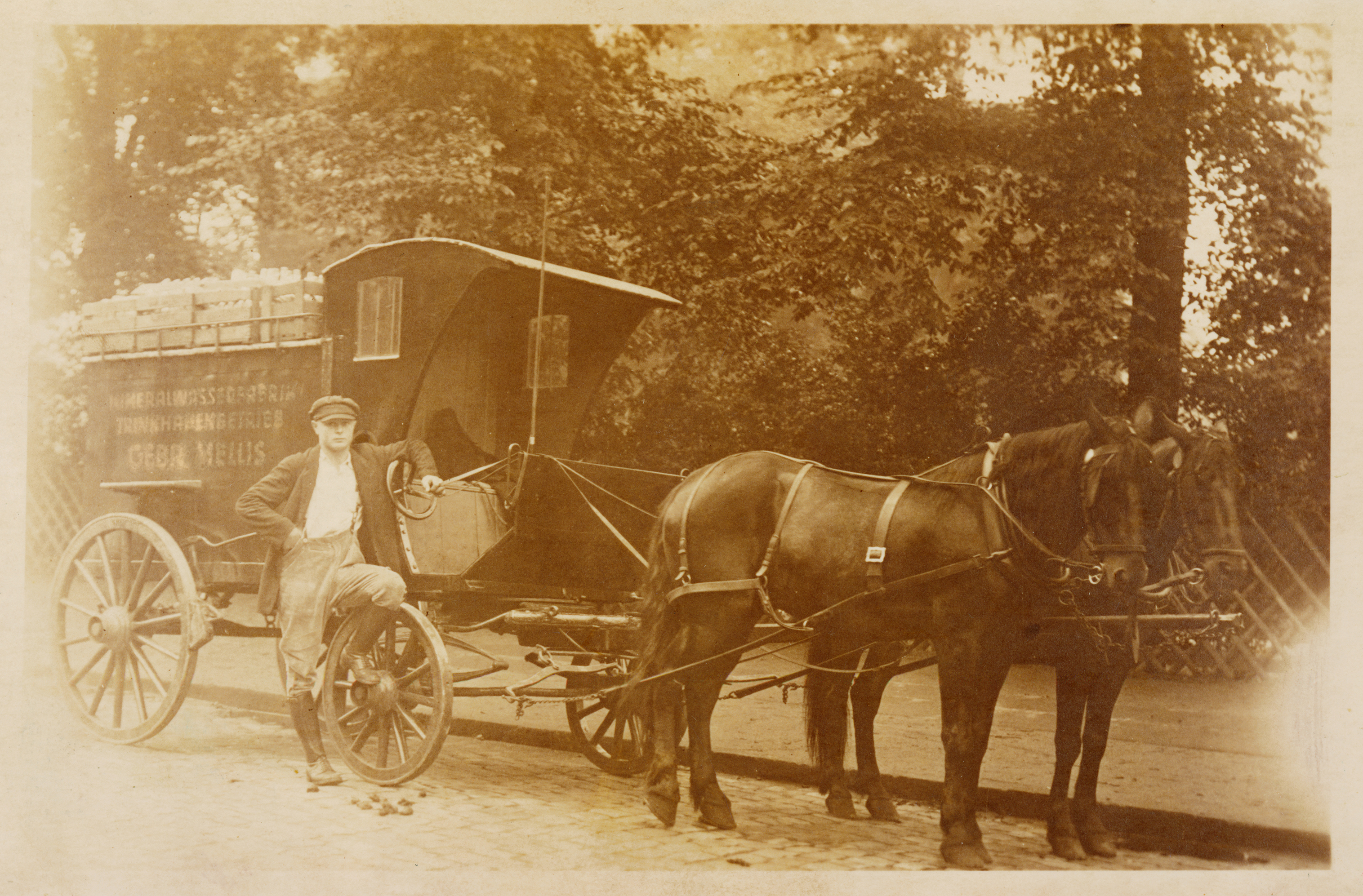 Mit diesen Kutschen lieferte die Schloss-Quelle Mellis GmbH bis 1925 die Getränke aus.